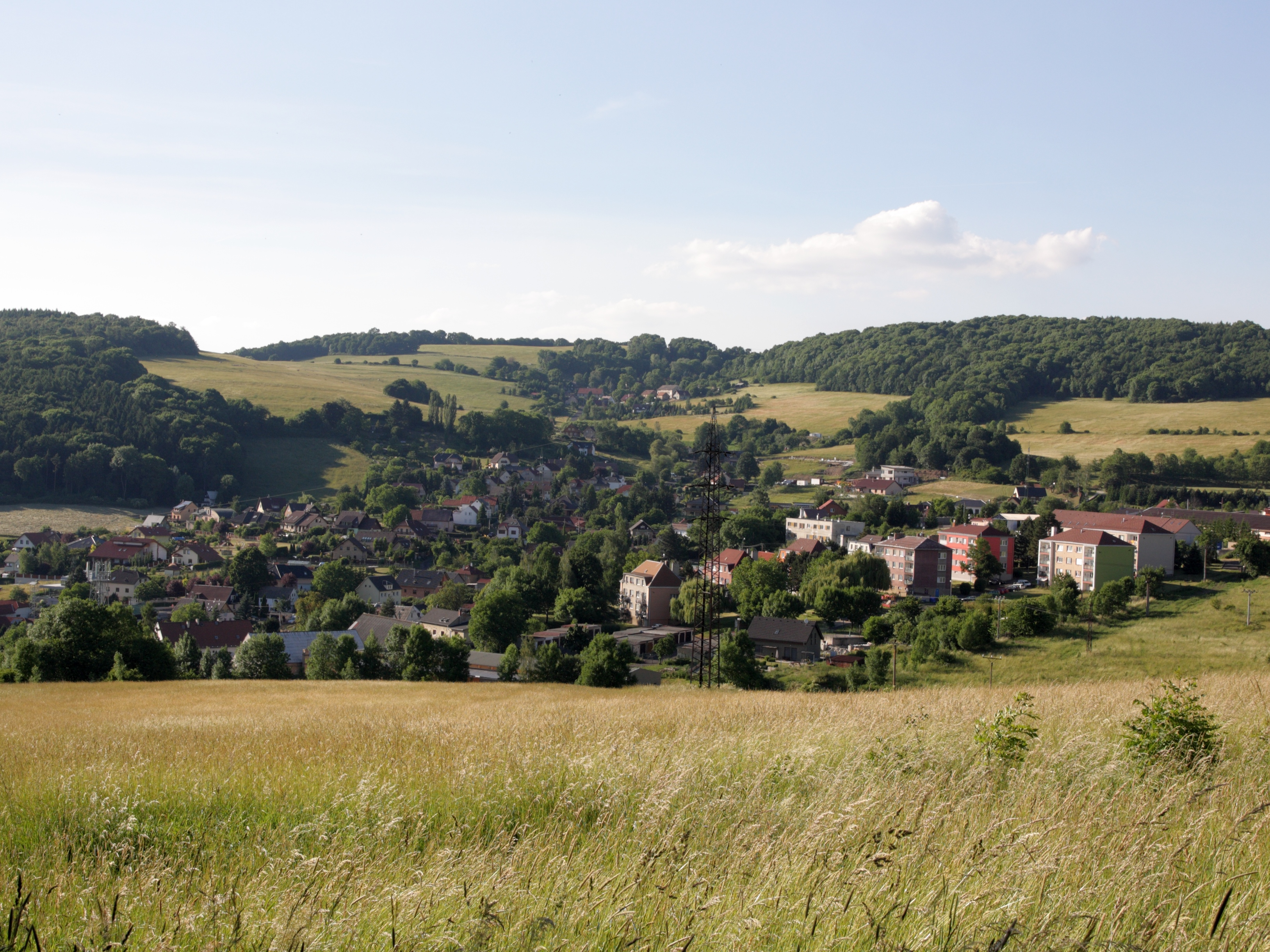 Chuderov - pohled od JJV.